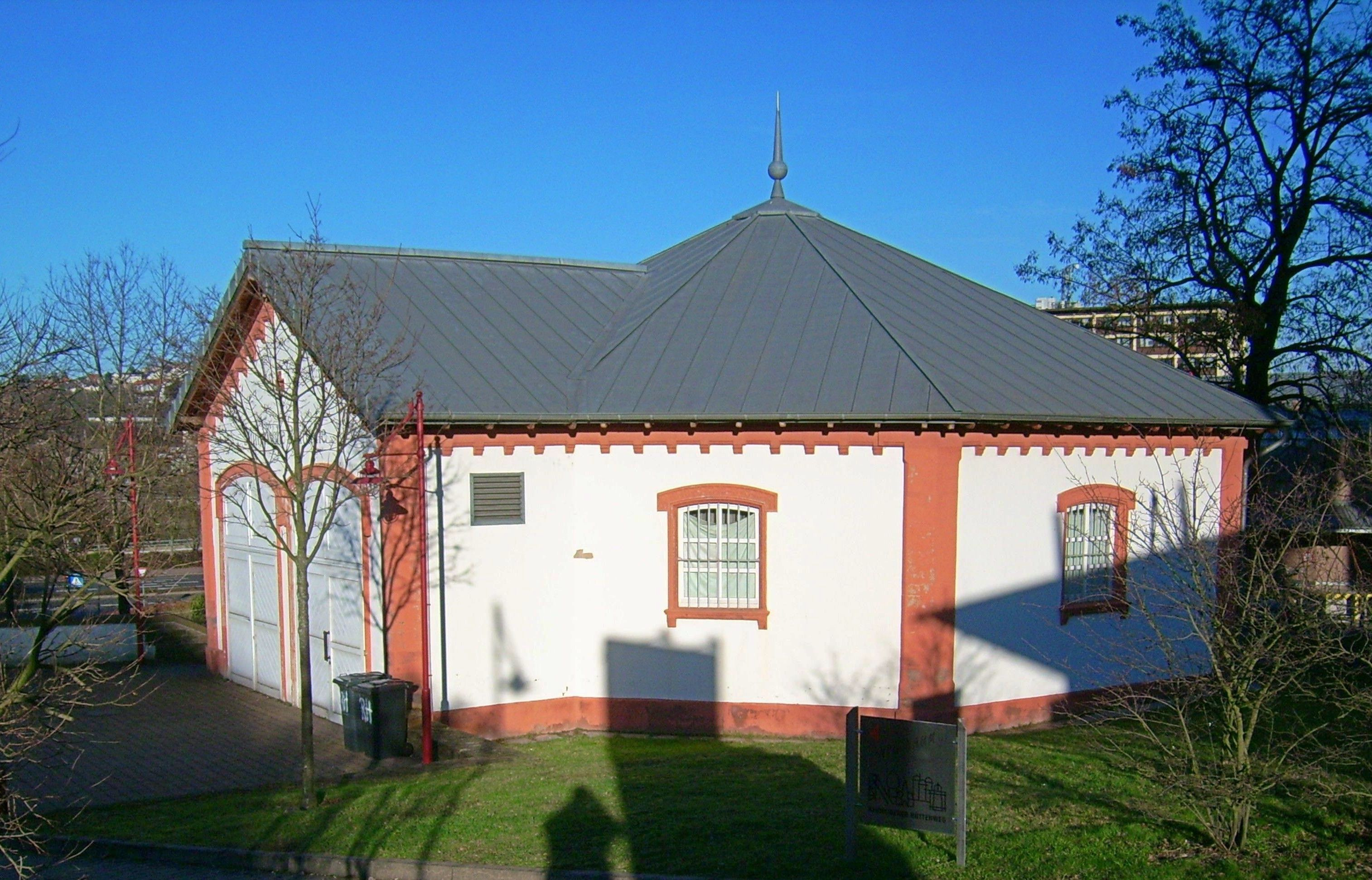 Reithalle Stumm in Neunkirchen (Saar) des ehemaligen Eisenwerks